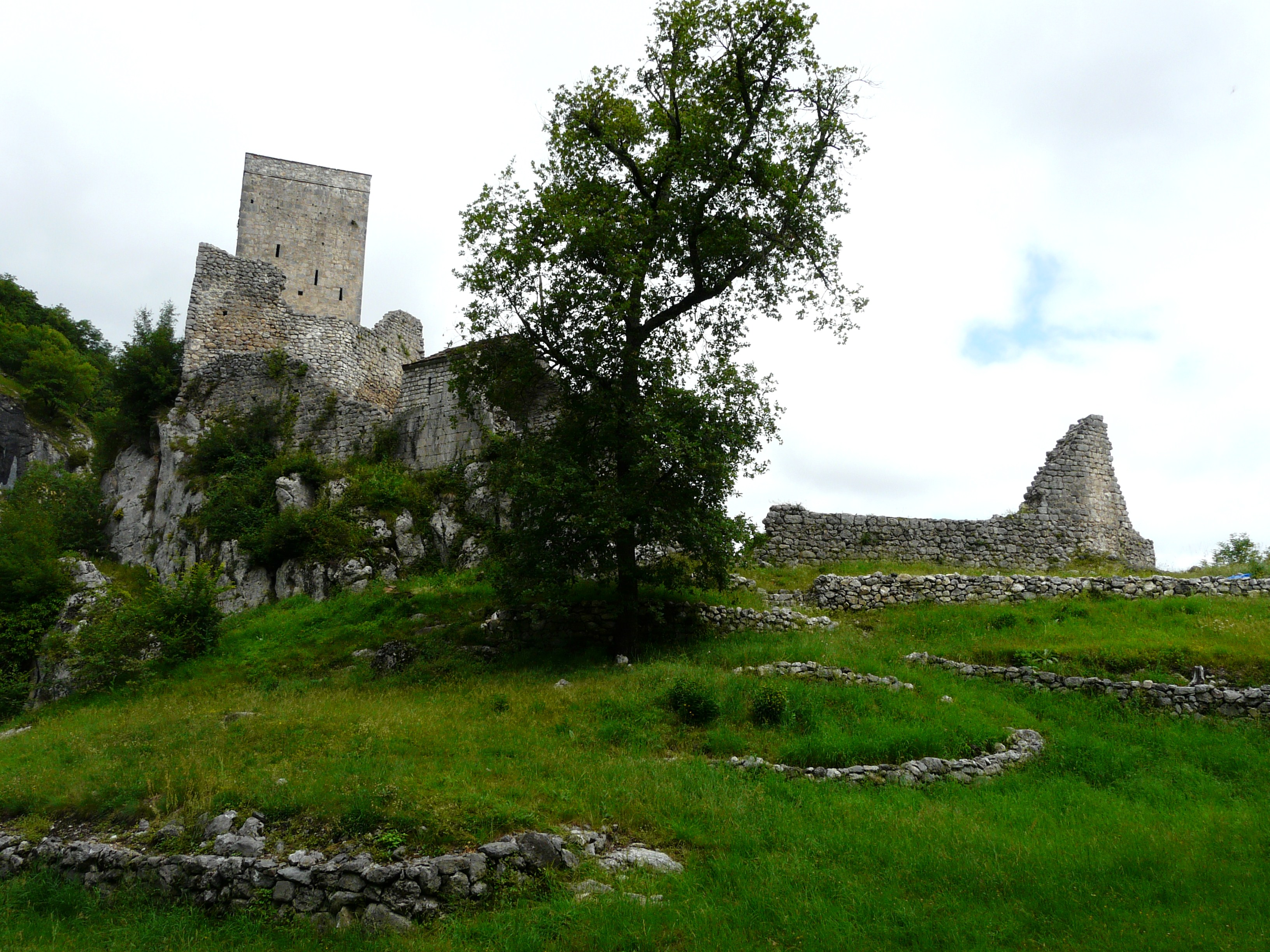 Les ruines du château des Comtes de Comminges, Bramevaque, Hautes-Pyrénées, France.